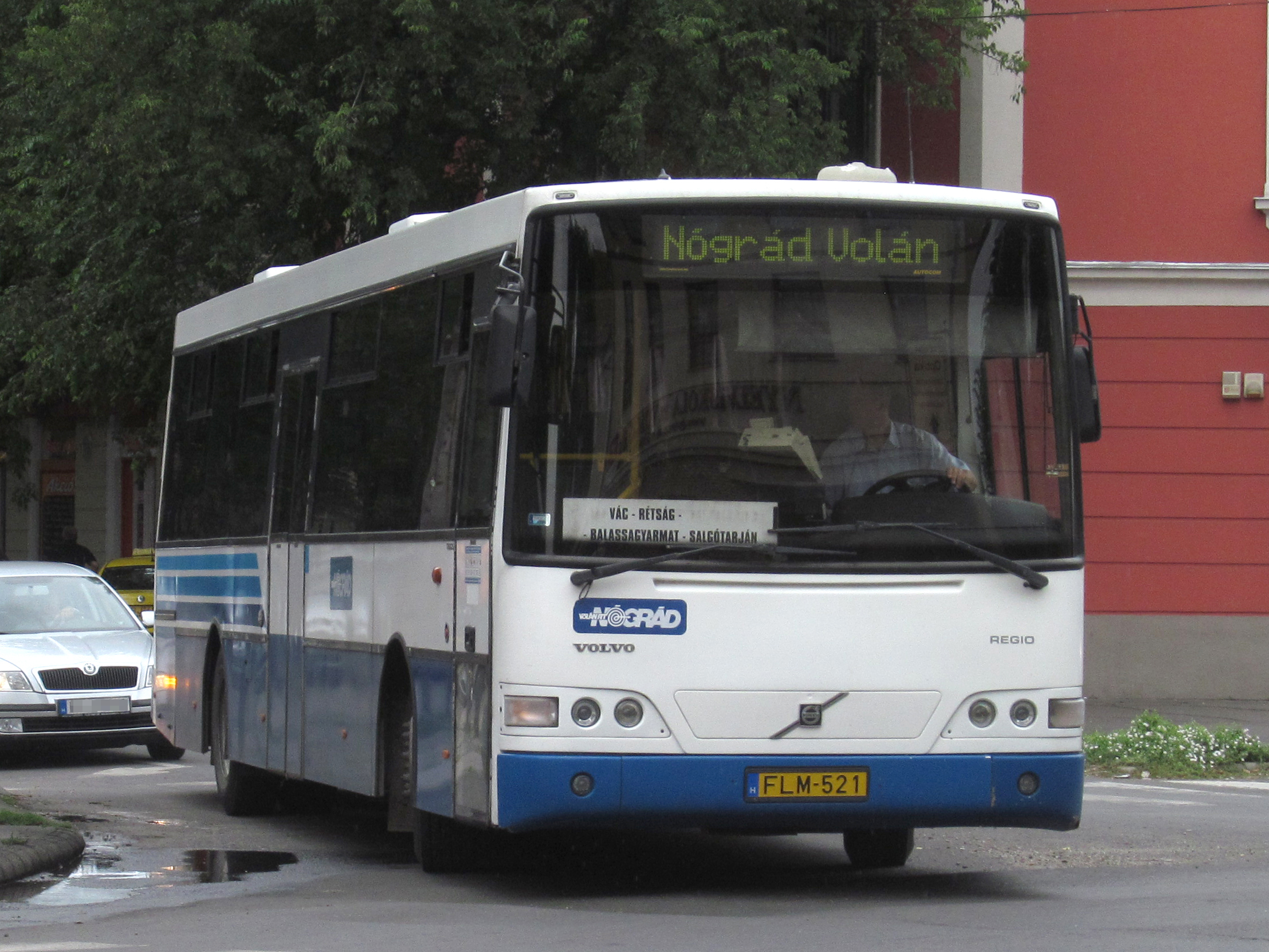 FLM-521 (JYL-617) Volvo-Alfa Regio (Vác, autóbusz-állomás)